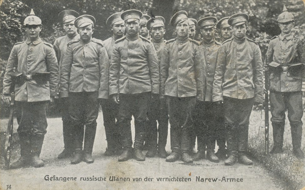 Gefangene Ulanen der Narew-Armee